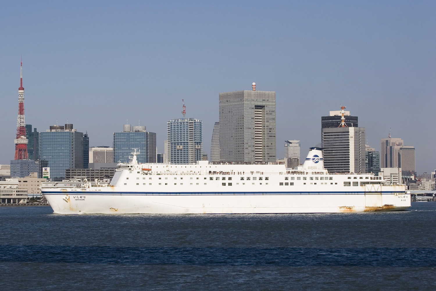 太平洋フェリー・いしかり(２代目)東京都港区台場 ※小笠原クルーズ運行時